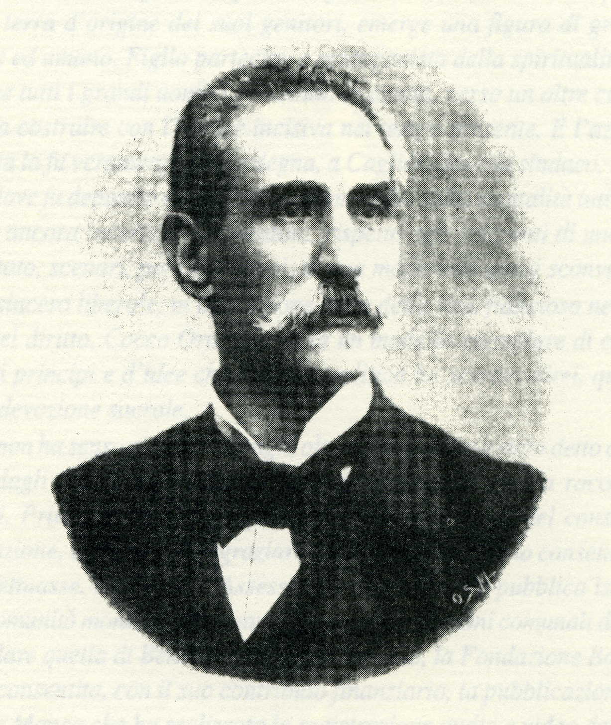 Francesco Cocco Ortu (1842-1929) sentore e deputato del regno d'Italia